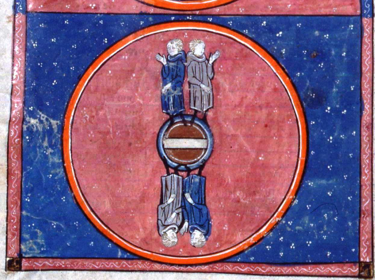 La rotondité de la Terre, Image du monde